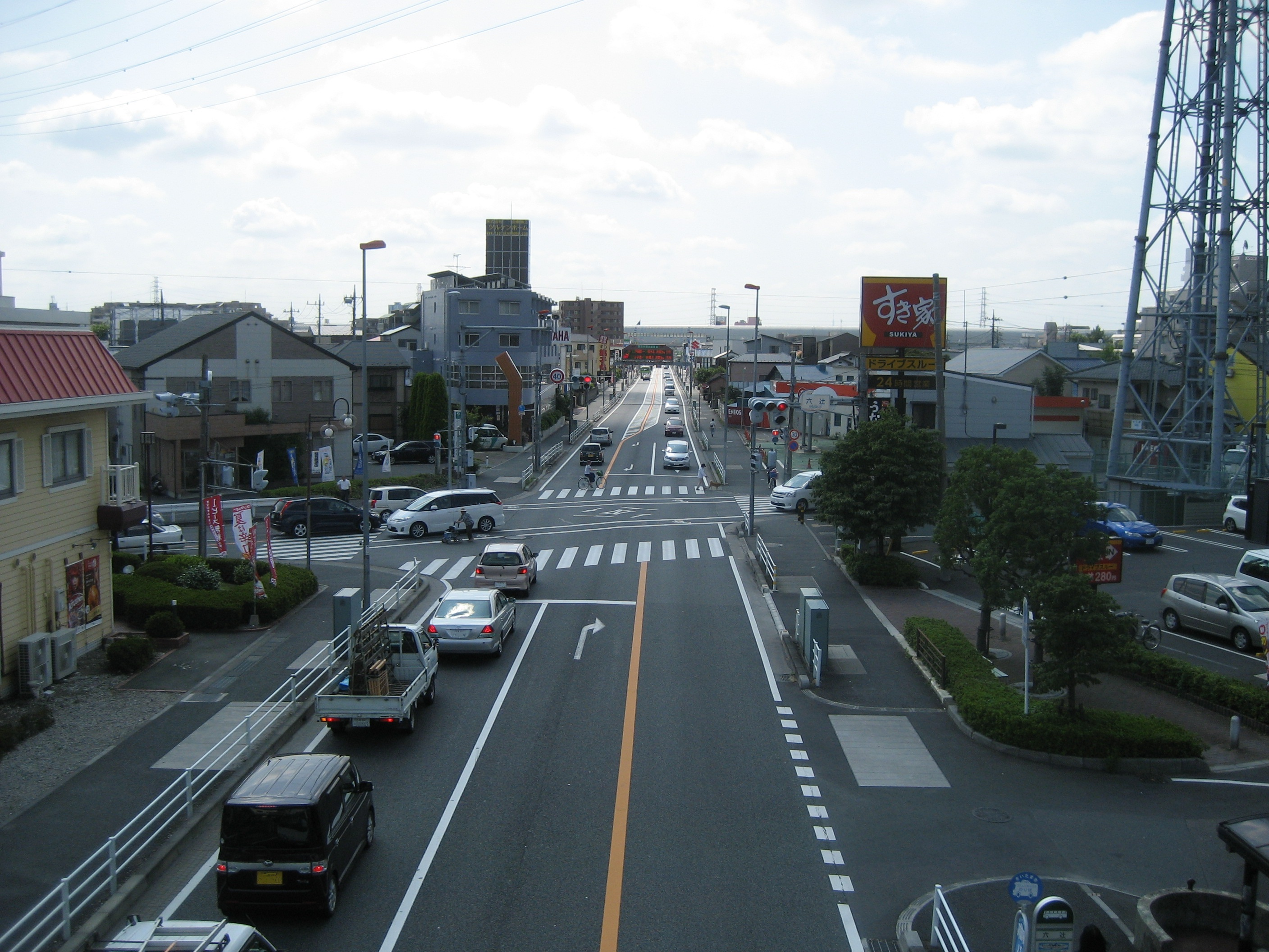 国道17号線さいたま市南区六辻交差点付近